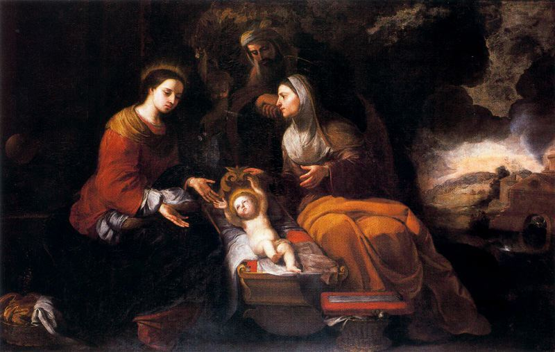 Sebastián Gómez, Sagrada Familia, óleo sobre lienzo, 160 x252 cm.